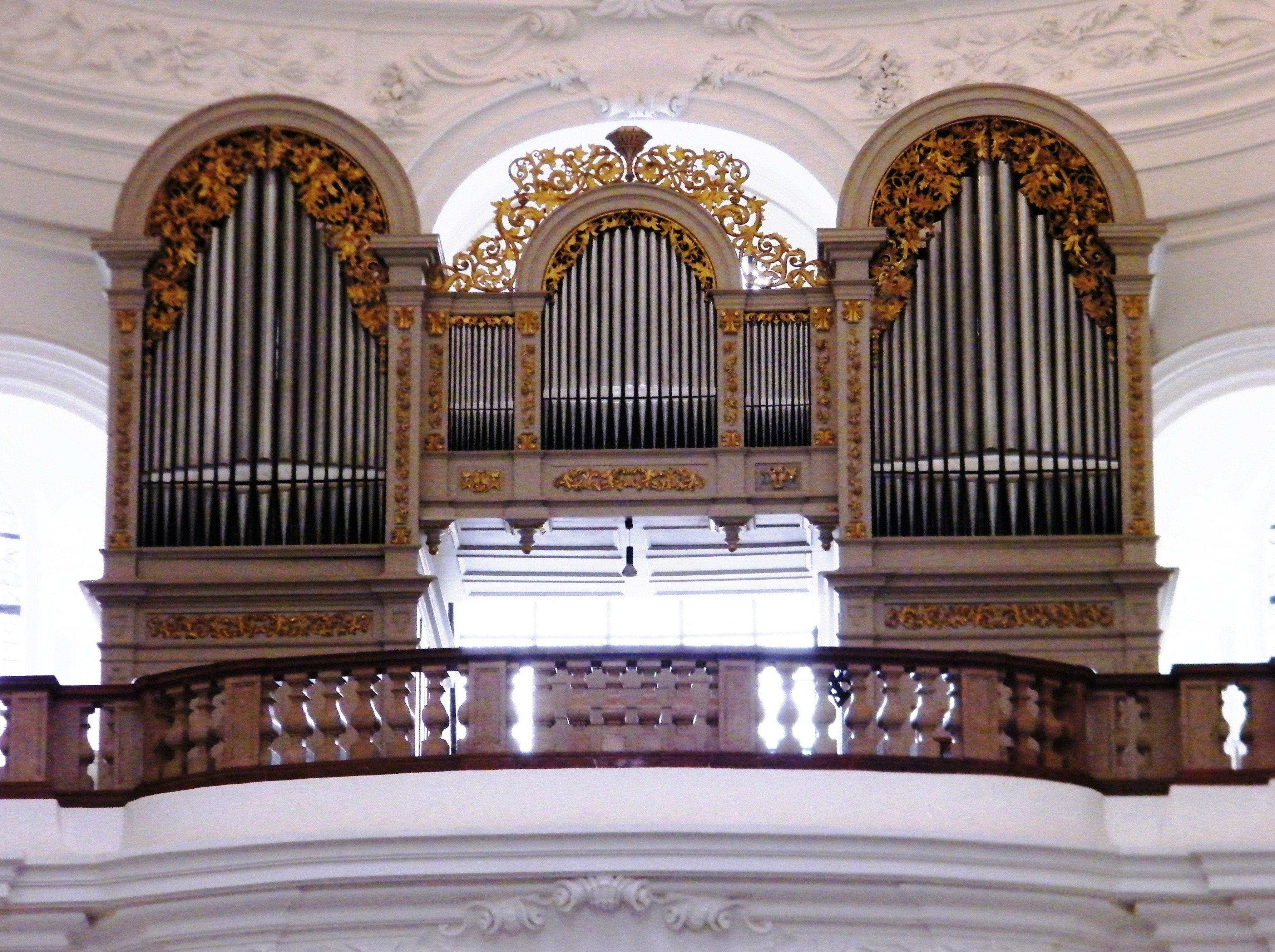 Mattäus Mauracher Orgel 1868 Collegienkirche